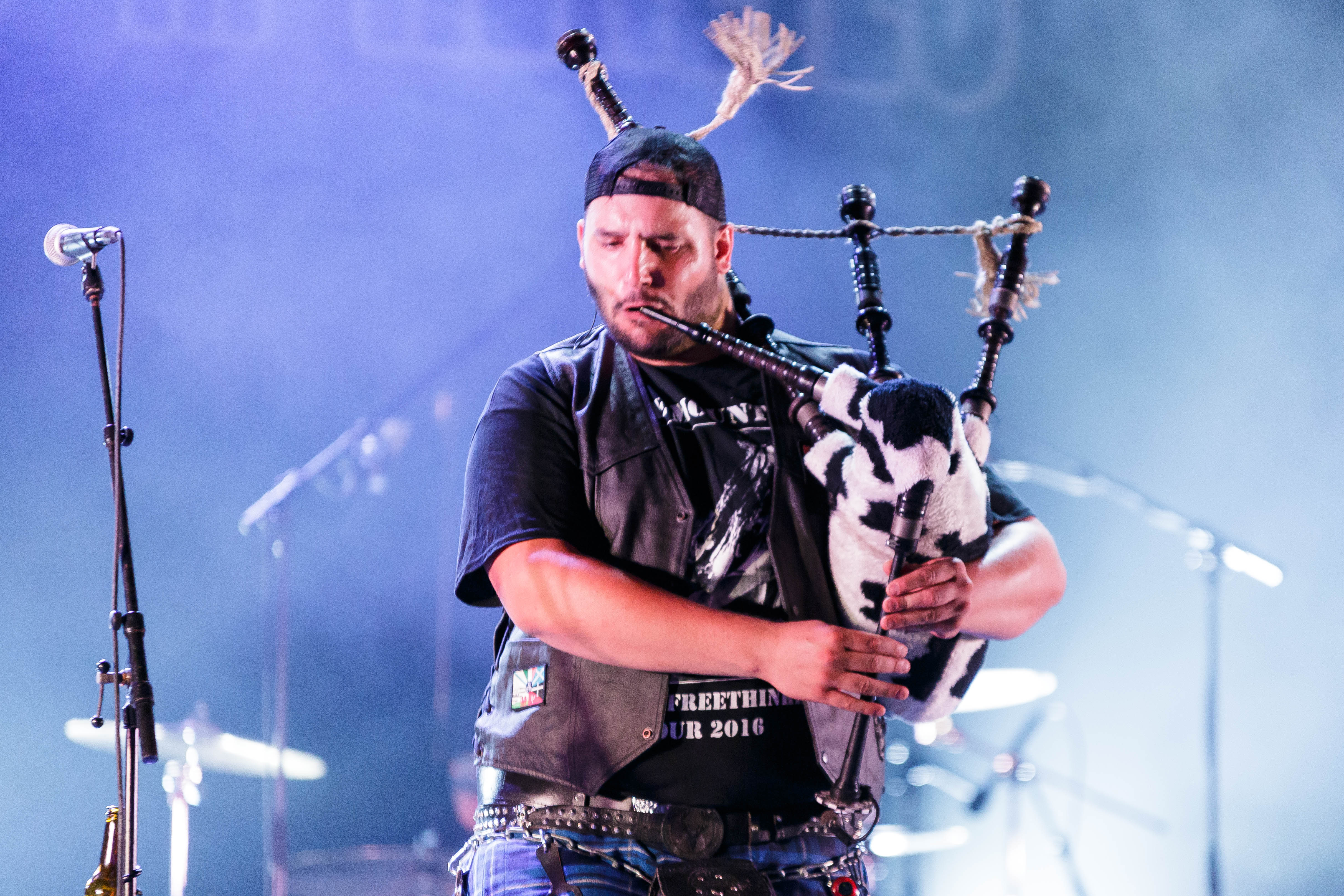 Paléo Festival Nyon, édition 2016, 19-24 juillet 2016. Dimanche 24: The Real McKenzies (folk-punk, Écosse)